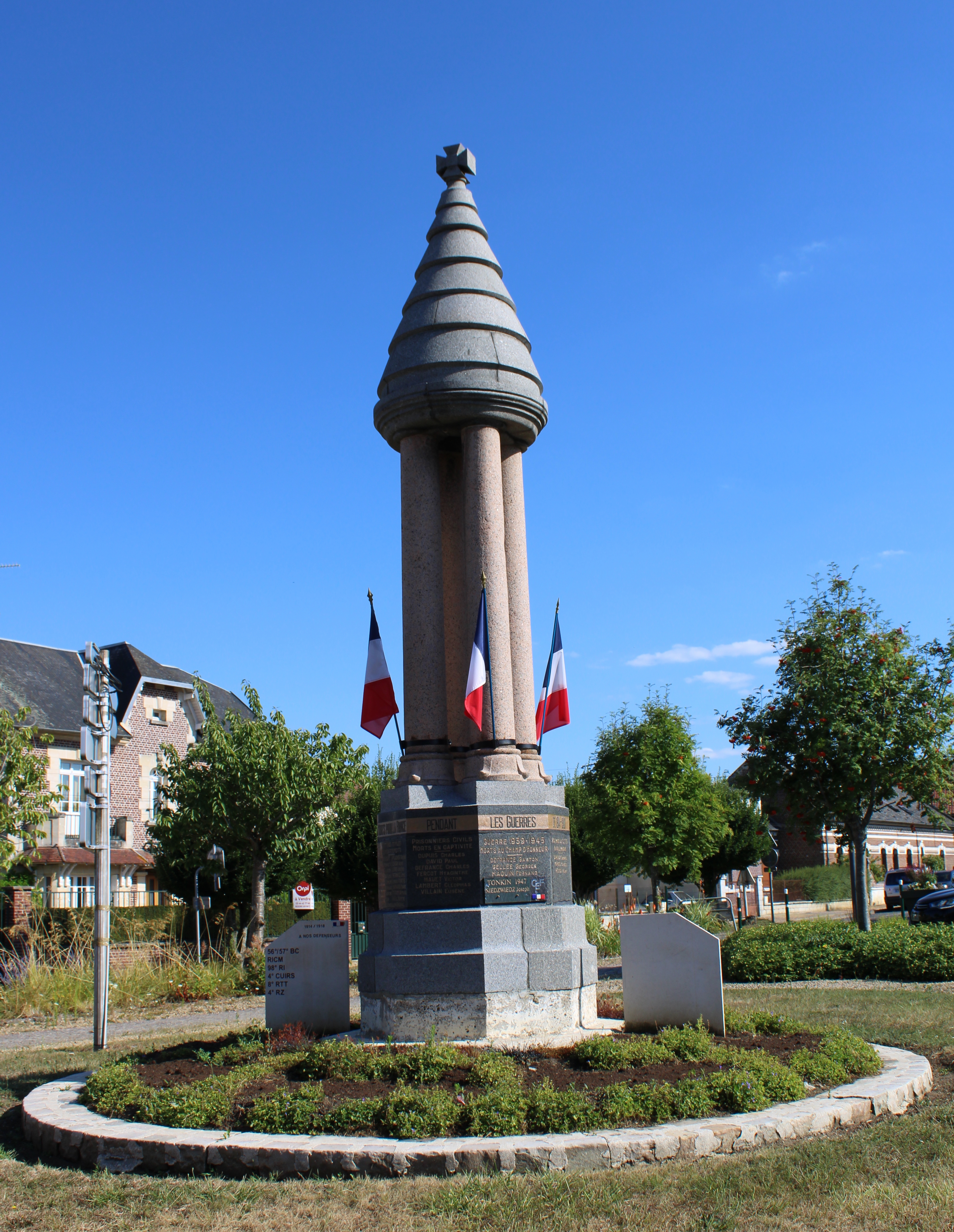 Le monument aux morts